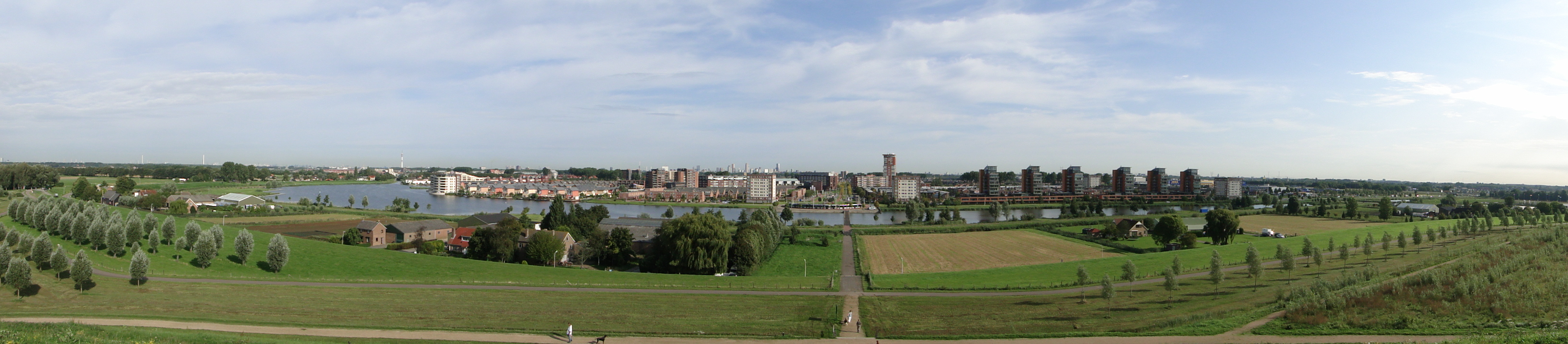 Koedood view